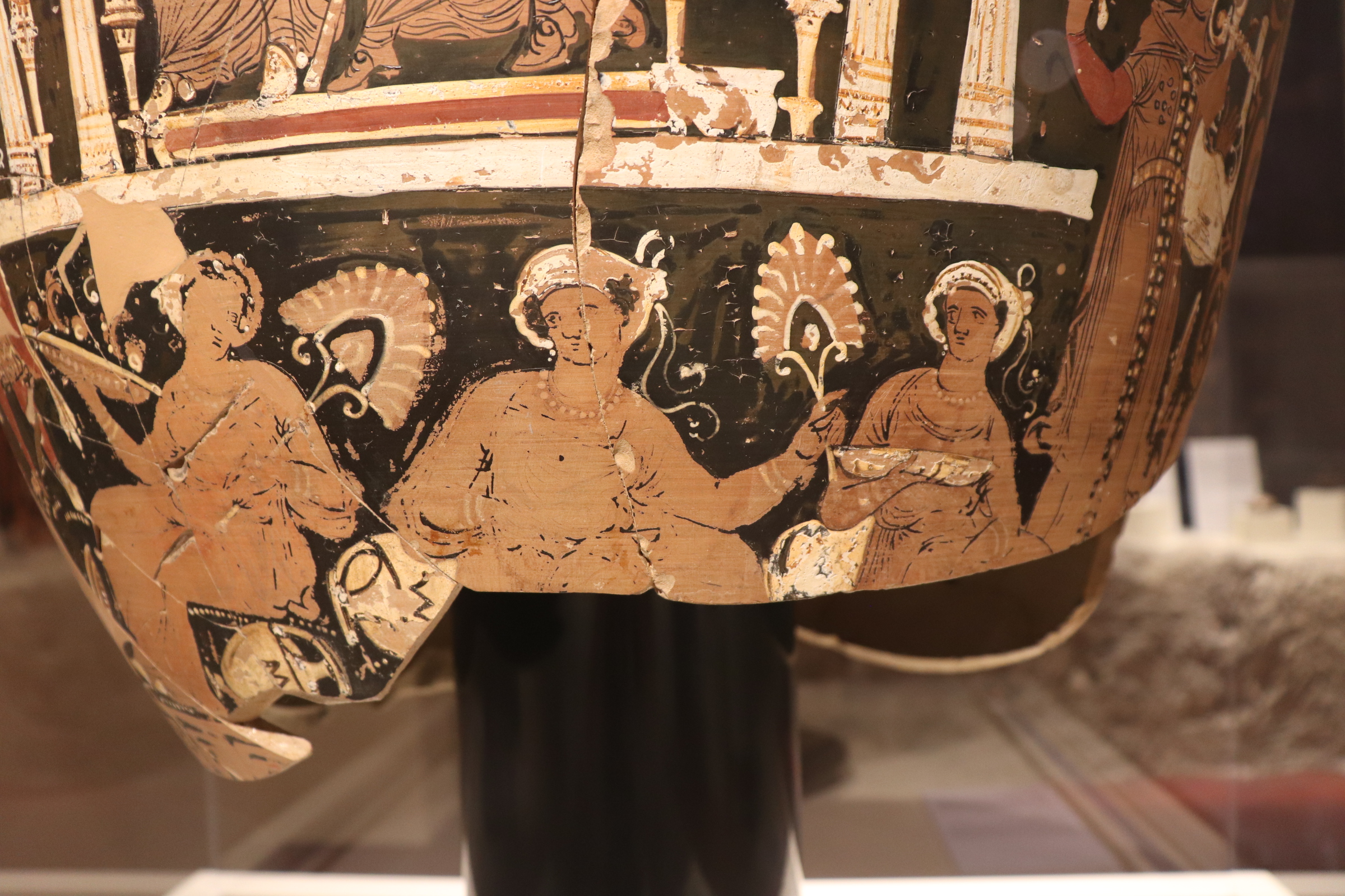 Cratere a volute, Pittore del Sakkos Bianco (320 a.C.) - Lato A (Danaidi)